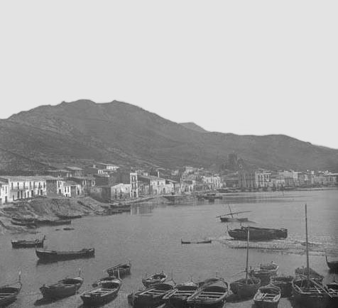 Vista general del Port de la Selva amb barques en primer terme. Frederic Bordas i Altarriba (ca. 1890)